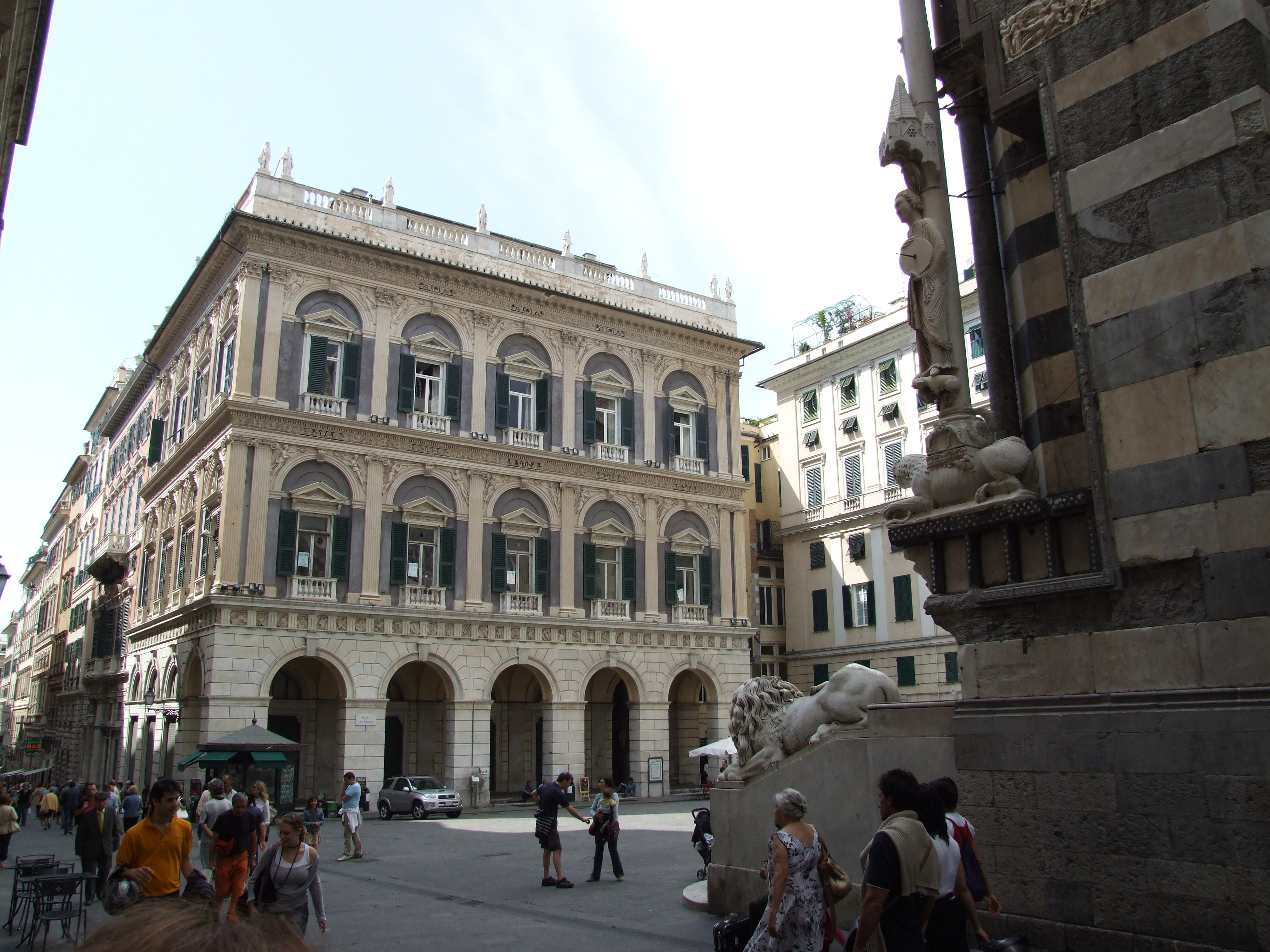 Genoa